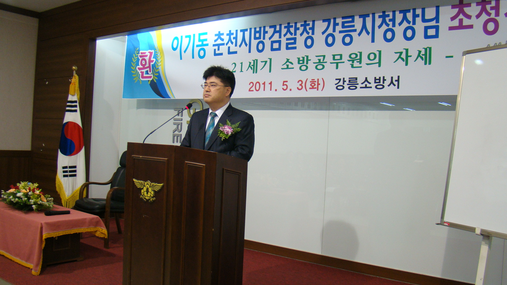 2011년 5월 2일 춘천지방검찰청 강릉지청장 이기동 강릉소방서 강연